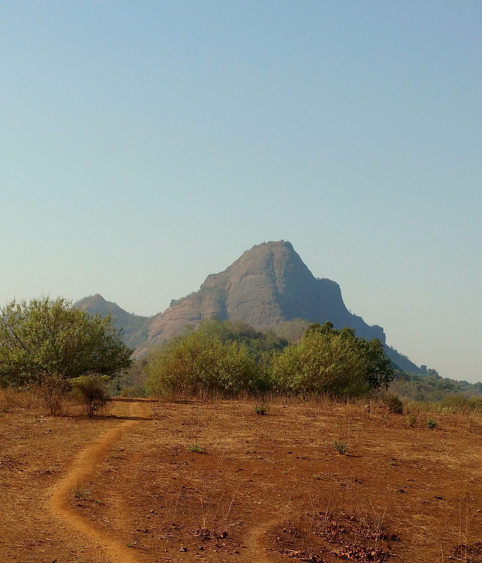 Manikgad fort from Katkarwadi